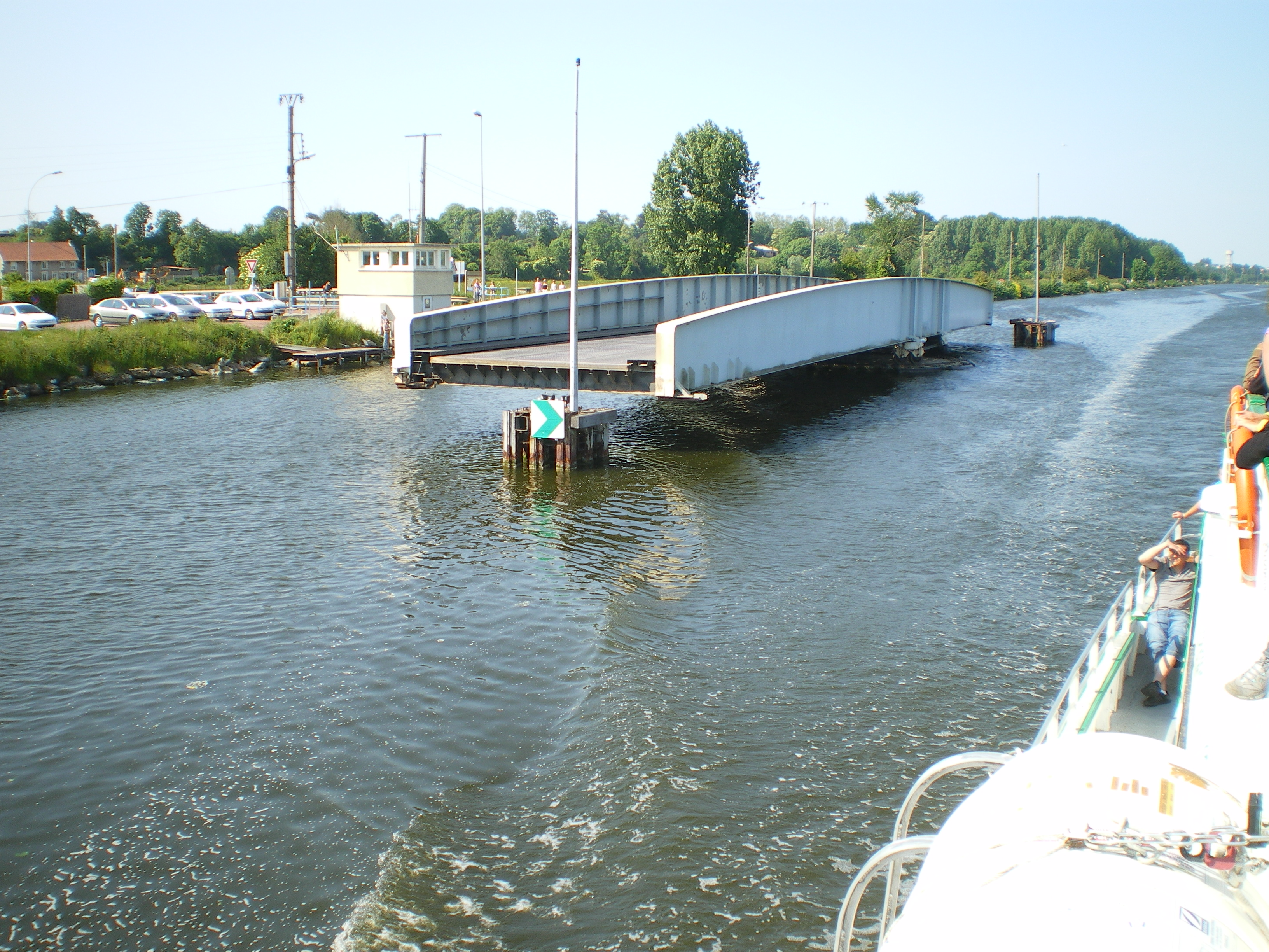 Pont tournant de Colombelles, ouvert, sur le Canal de Caen à la mer, entre Hérouville-Saint-Clair et Colombelles.